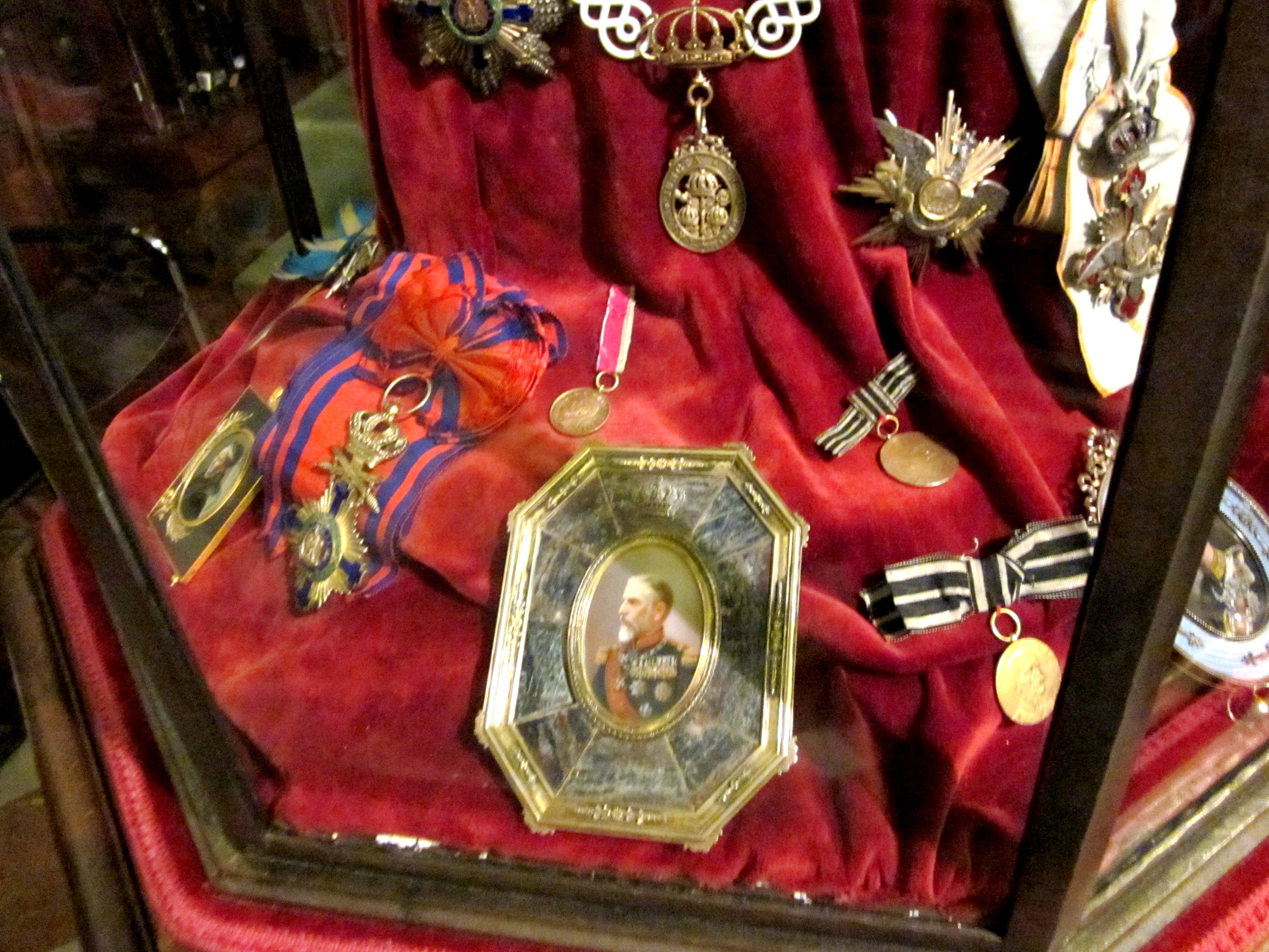 Ansamblul Castelului Peles PH-II-a-A-16696